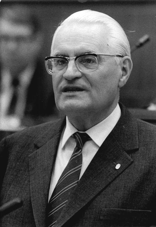 ADN-ZB/Mittelstädt 17.6.86- Berlin: Volkskammertagung In der Diskussion sprach für die CDU-Fraktion der Abgeordnete Gerald Götting.